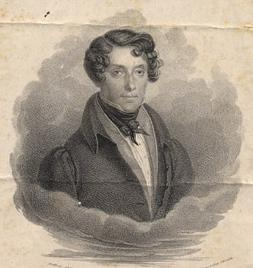 Portrait of italian opera singer Giovanni Batusta Velluti (1806-1882)